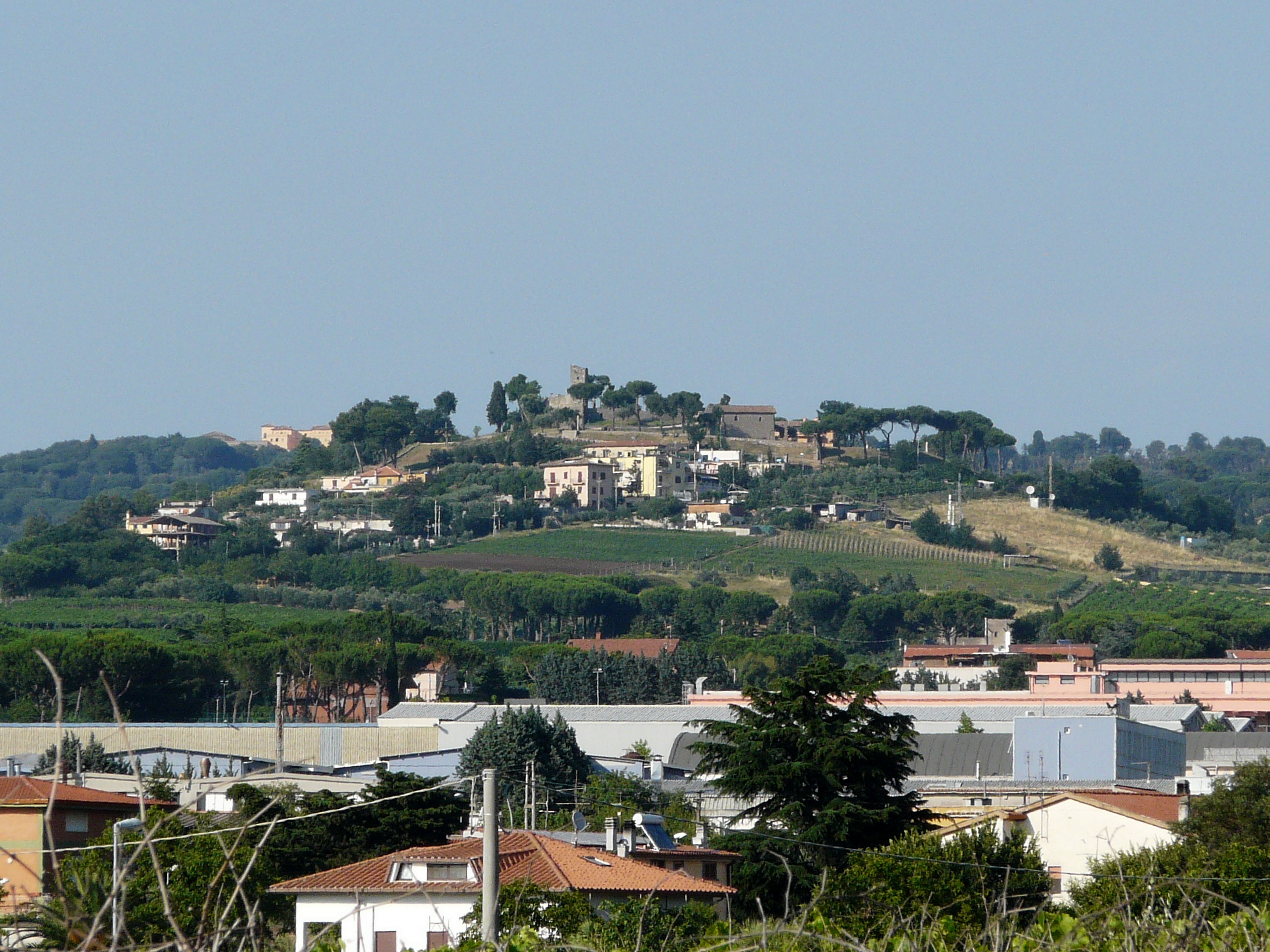 Albano Laziale, panorama di Monte Savello ed i ruderi del castello